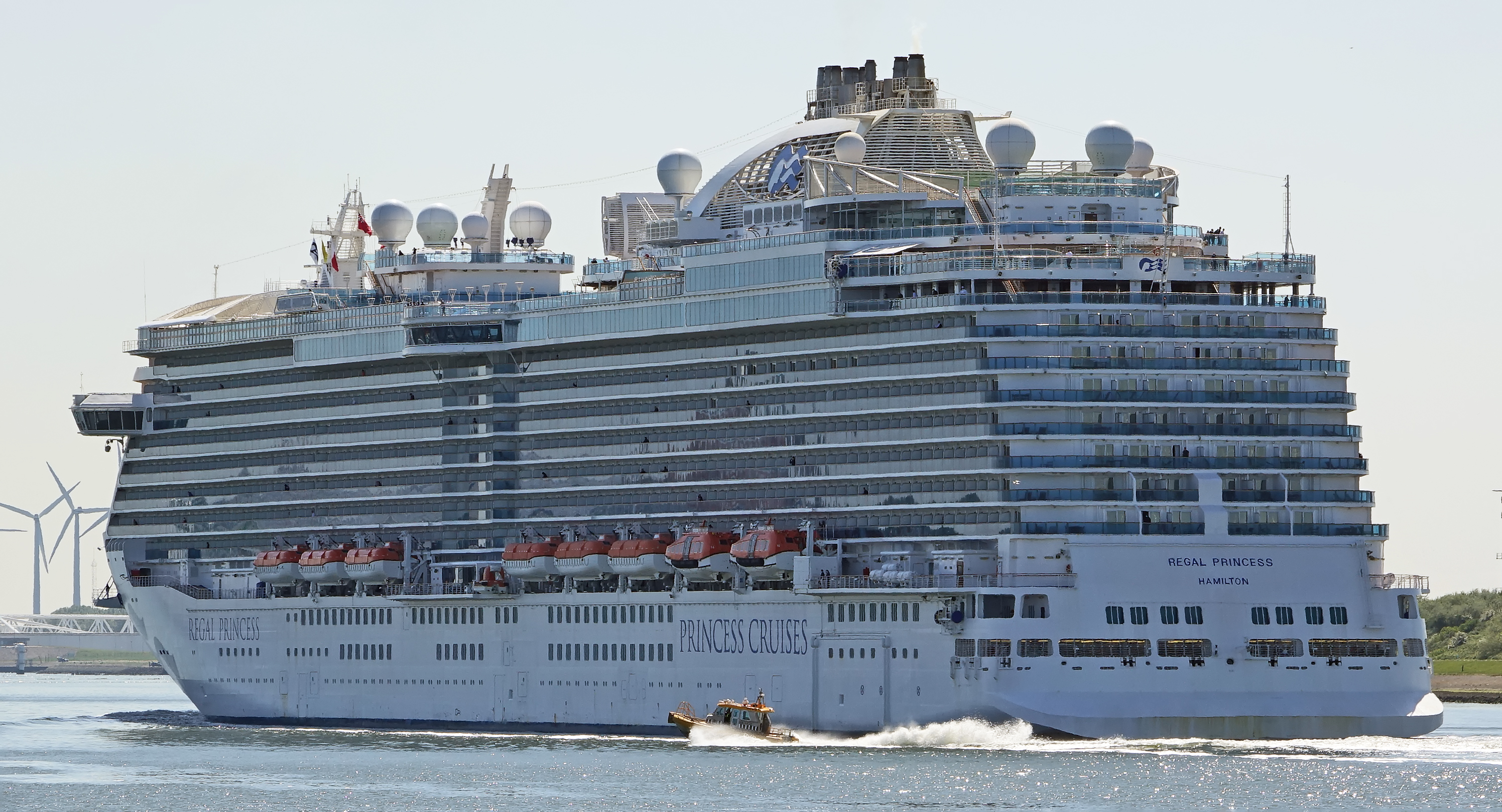 Hoek van Holland 6-5-2020 Het cruiseschip heeft 940 passagiers aan boord. Het gaat om 14 Nederlanders en uit 22 andere Europese landen afkomstige bemanningsleden van de Holland America Group, voornamelijk Serviërs en Oekraïners. Ze zijn afkomstig van diverse schepen van o.a. de rederijen Seabourn, Princess en Holland America Line. De reizigers zijn op weg naar huis en verlaten in Rotterdam het schip.